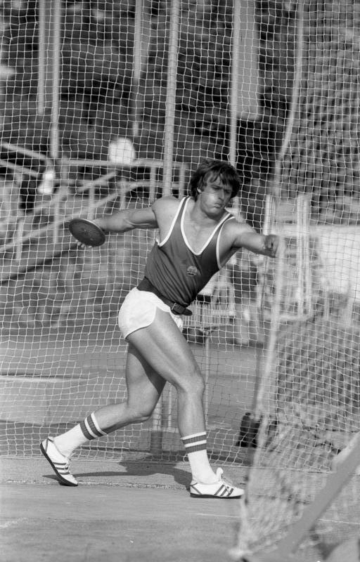 Diskuswerfer Wolfgang Schmidt ADN-ZB/Richter/13.06.81/Dresden: Leichtathletik-Länderkampf DDR - Großbritannien/ Zu den guten Leistungen des ersten Tages dieses traditionellen Vergleichs zählten die 69,90 m von Diskuswerfer Wolfgang Schmidt (SC Dynamo Berlin). Abgebildete Personen: Schmidt, Wolfgang: Leichtathlet, Diskuswerfer, Olympiateilnehmer 1976, DDR